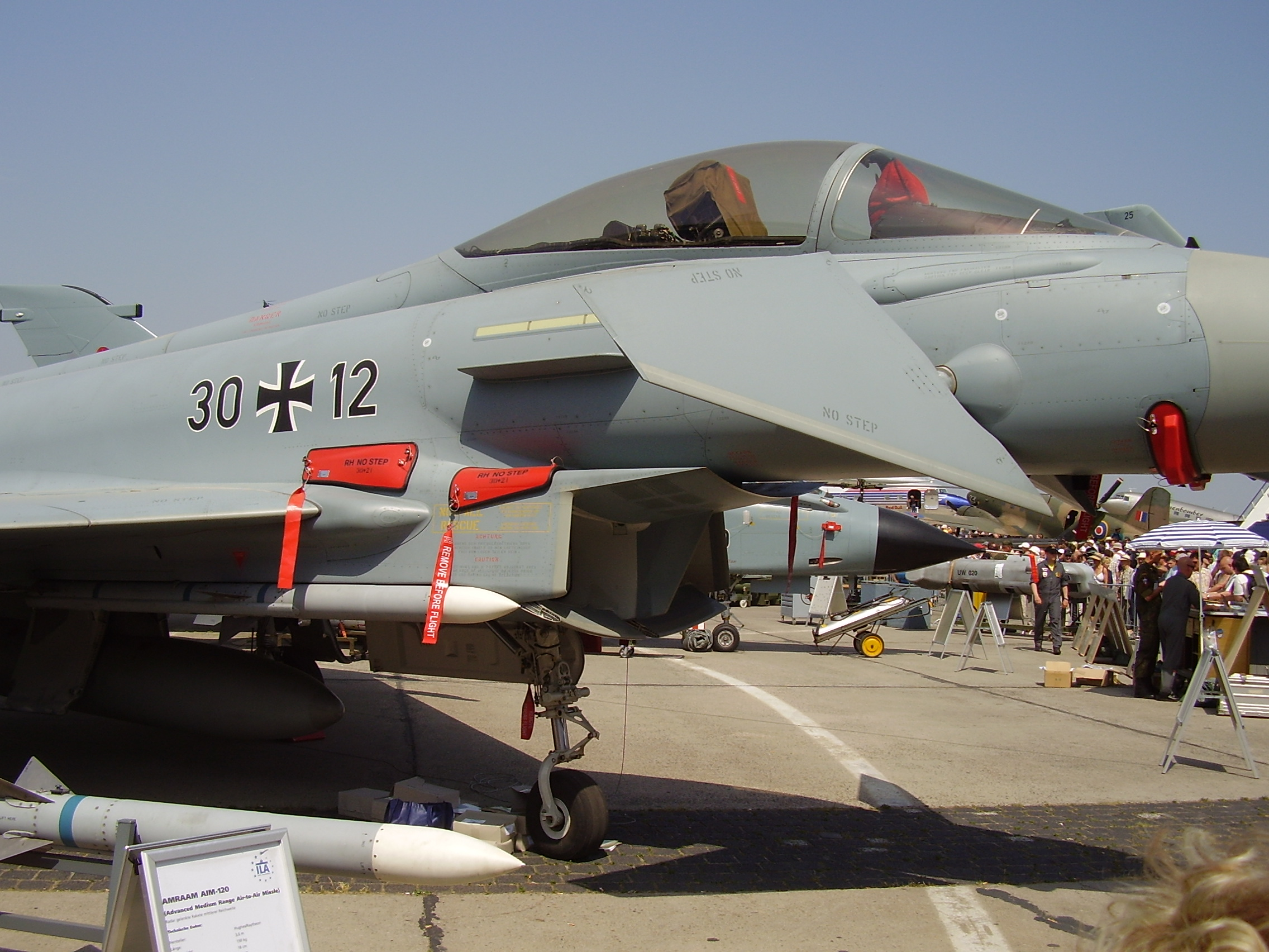 ILA 2008, registration 30+12